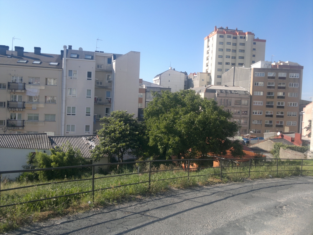 O Camiño do Pinar, na Coruña (Galiza).